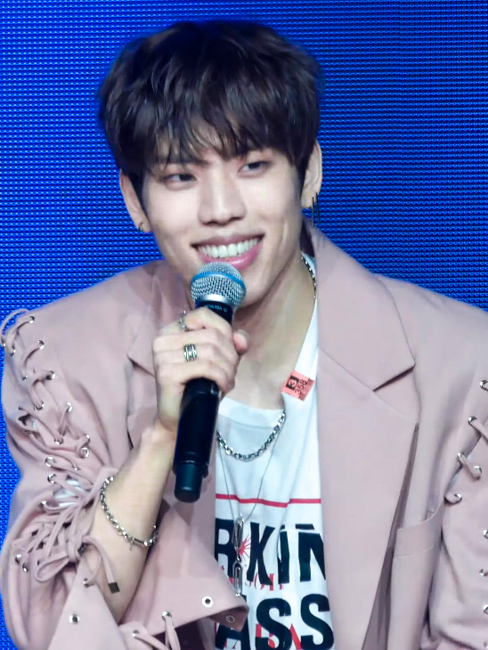 4일 오후 서울시 강남구 청담동 일지아트홀에서 인피니트 장동우의 1st 미니앨범 'Bye' 발매기념 쇼케이스가 열려 장동우가 질의응답을 하고 있다. 이번 앨범은 '바이' 라는 앨범 타이틀에서도 알 수 있듯이, 장동우의 군입대 전 마지막 앨범인 동시에 'Beside You Every moment(모든 순간 너의 옆에)'란 중의적인 뜻이 담겨있다. 타이틀곡 '뉴스(NEWS)'를 비롯한 다양한 총 7트랙이 수록되어 있으며, BLSSD, DAVINK, GALLERY, The Need, twlv, GONI 등 트렌디한 작사, 작곡가들이 참여해 앨범의 완성도를 한층 높였다. 동우 #장동우 #인피니트 #INFINITE #Bye 동우, 장동우, 인피니트, INFINITE, Bye, News